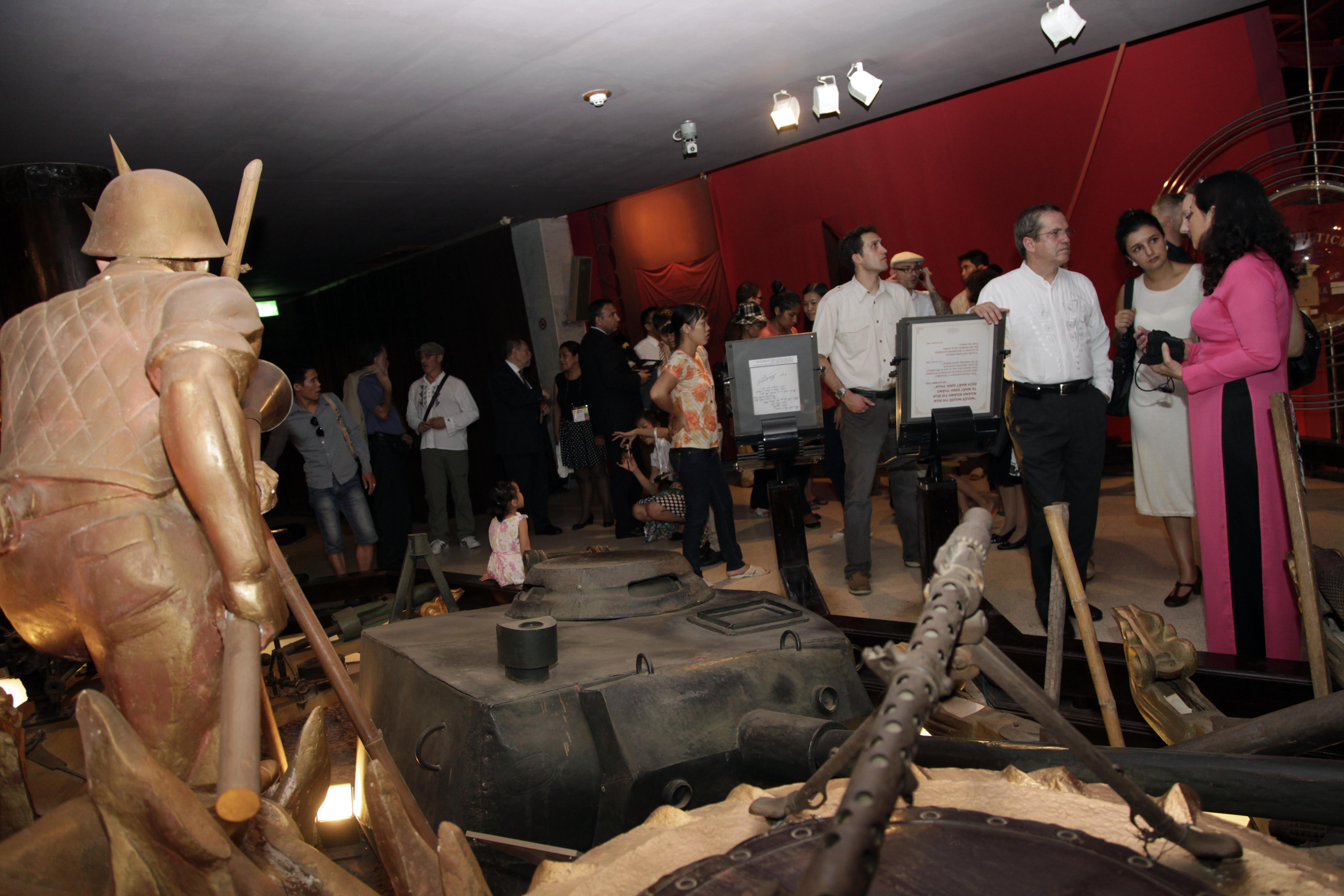 Hanoi (Vietnam), 23 de Junio del 2013. El Canciller Ricardo Patiño realizó una visita al museo del Presidente Ho Chi Minh. Foto: Xavier Granja Cedeño - Ministerio de Relaciones Exteriores y Movilidad Humana